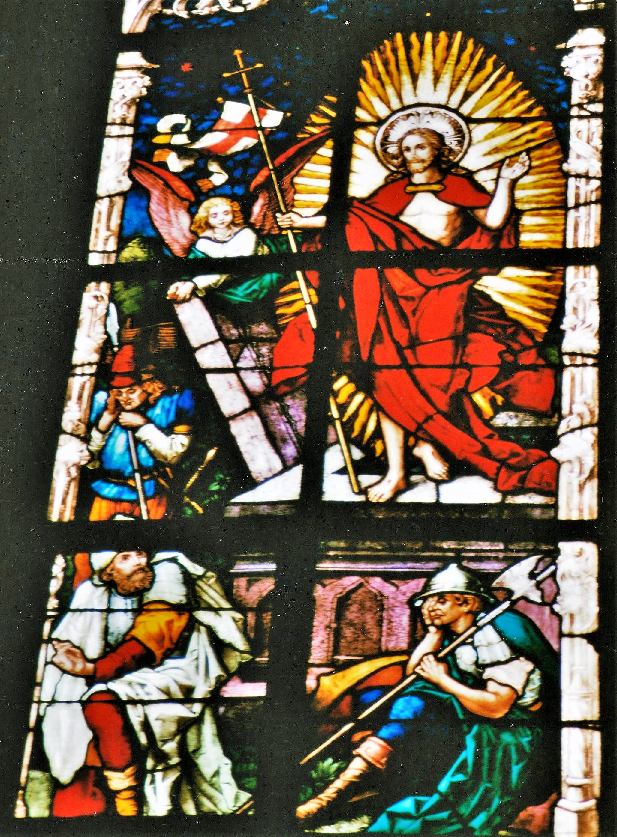 St. Michael (Lohr am Main), Chorfenster, Glorreicher Rosenkranz: Der von den Toten auferstanden ist